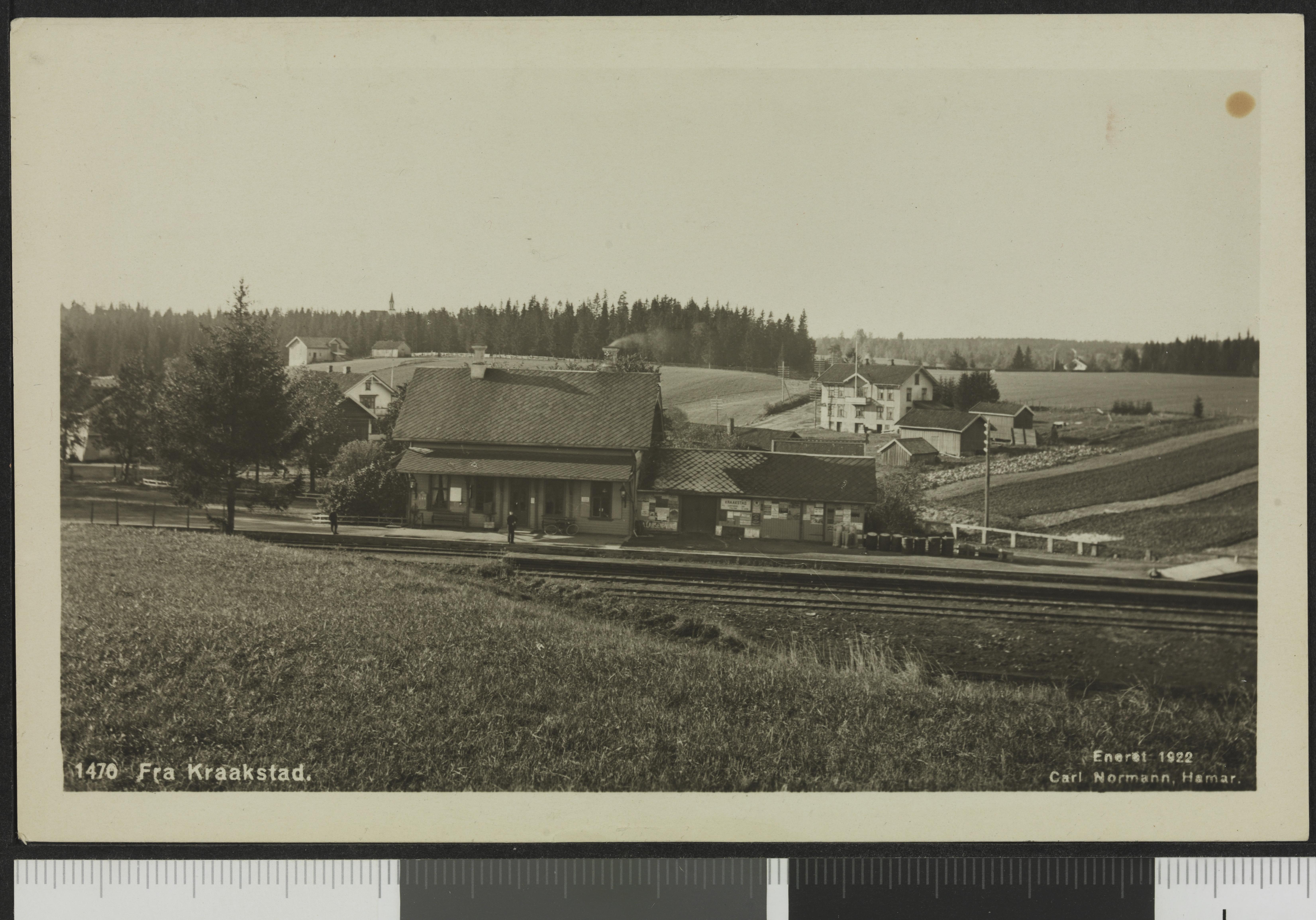 Bildet er hentet fra Nasjonalbibliotekets bildesamling Kråkstad,Kråkstad stasjon, Ski, Akershus